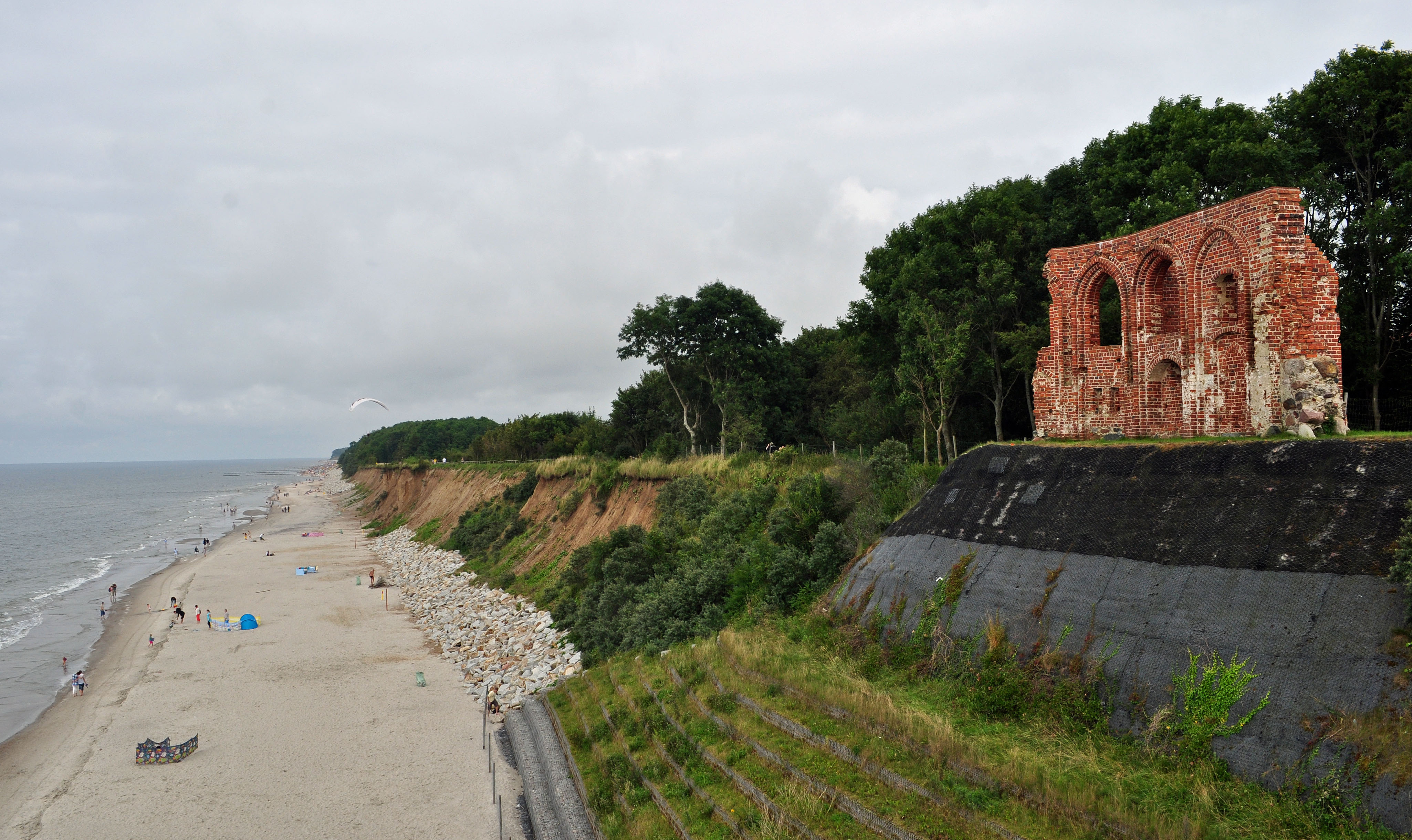 Trzęsacz, Kirchenruine, b (2011-07-31) by Klugschnacker in Wikipedia